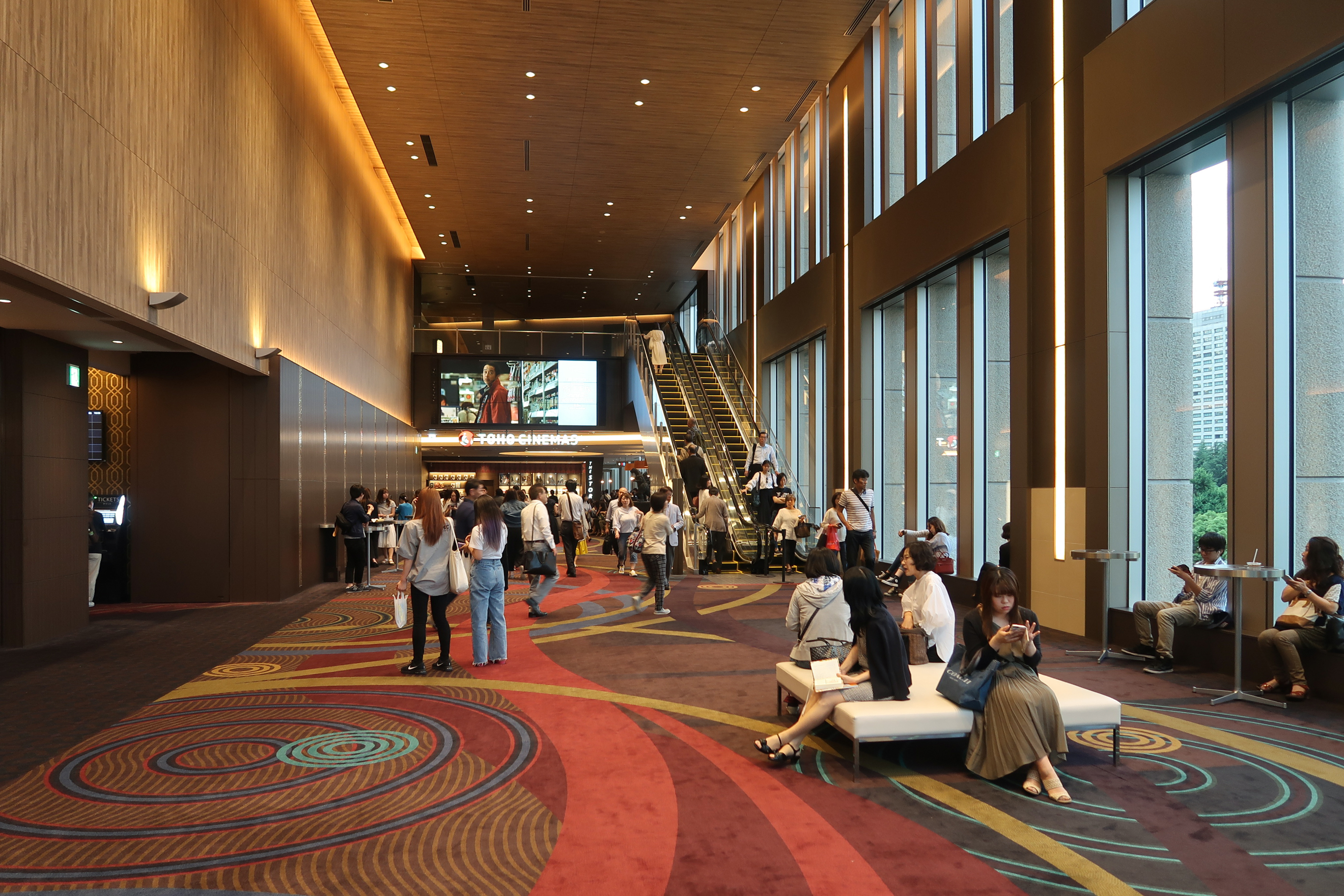 Tokyo Midtown Hibiya TOHO Cinema